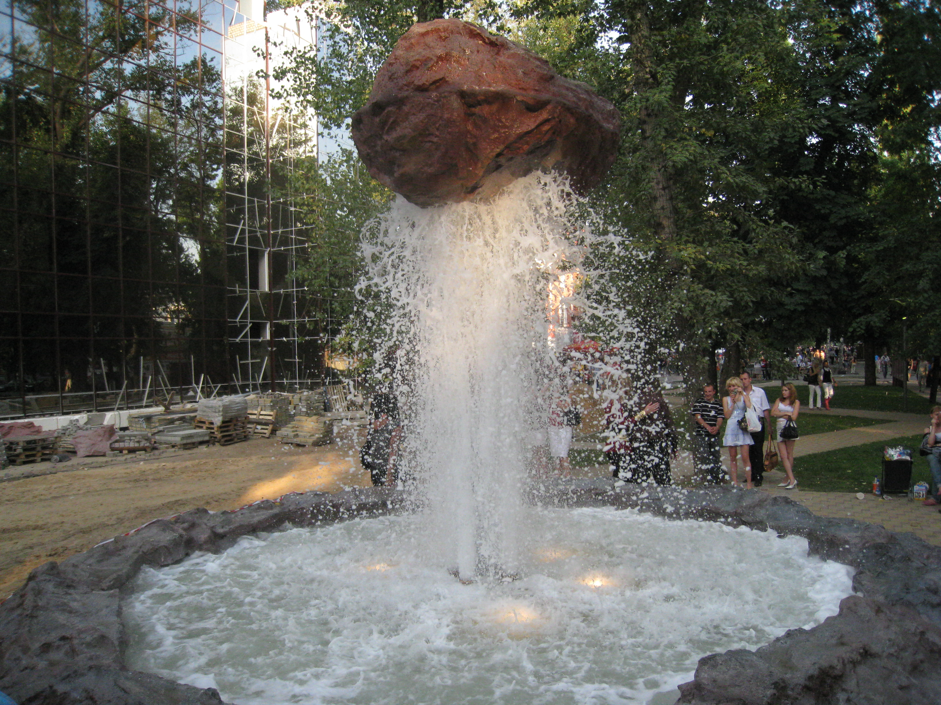 Фонтан в сквере у ТЦ Десперадо